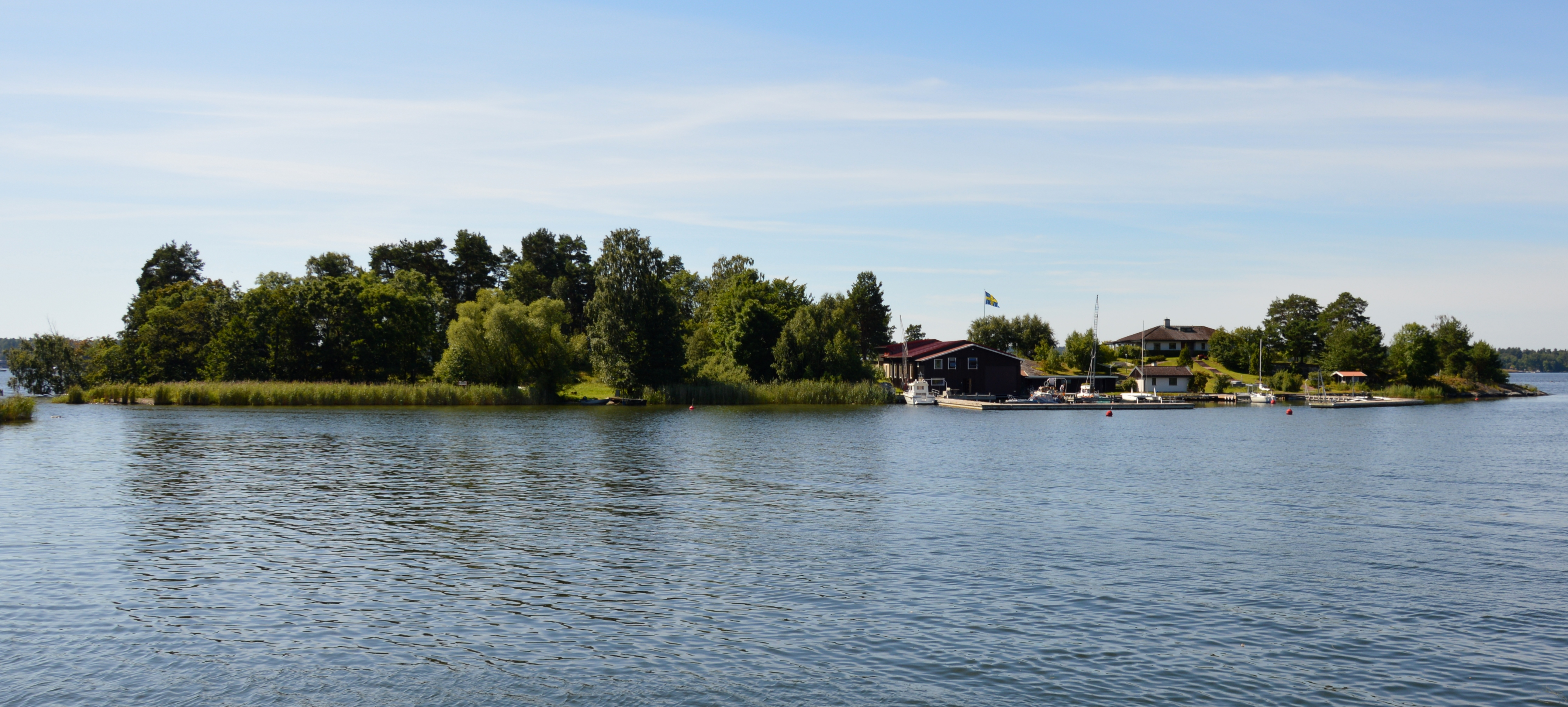 Notholmen